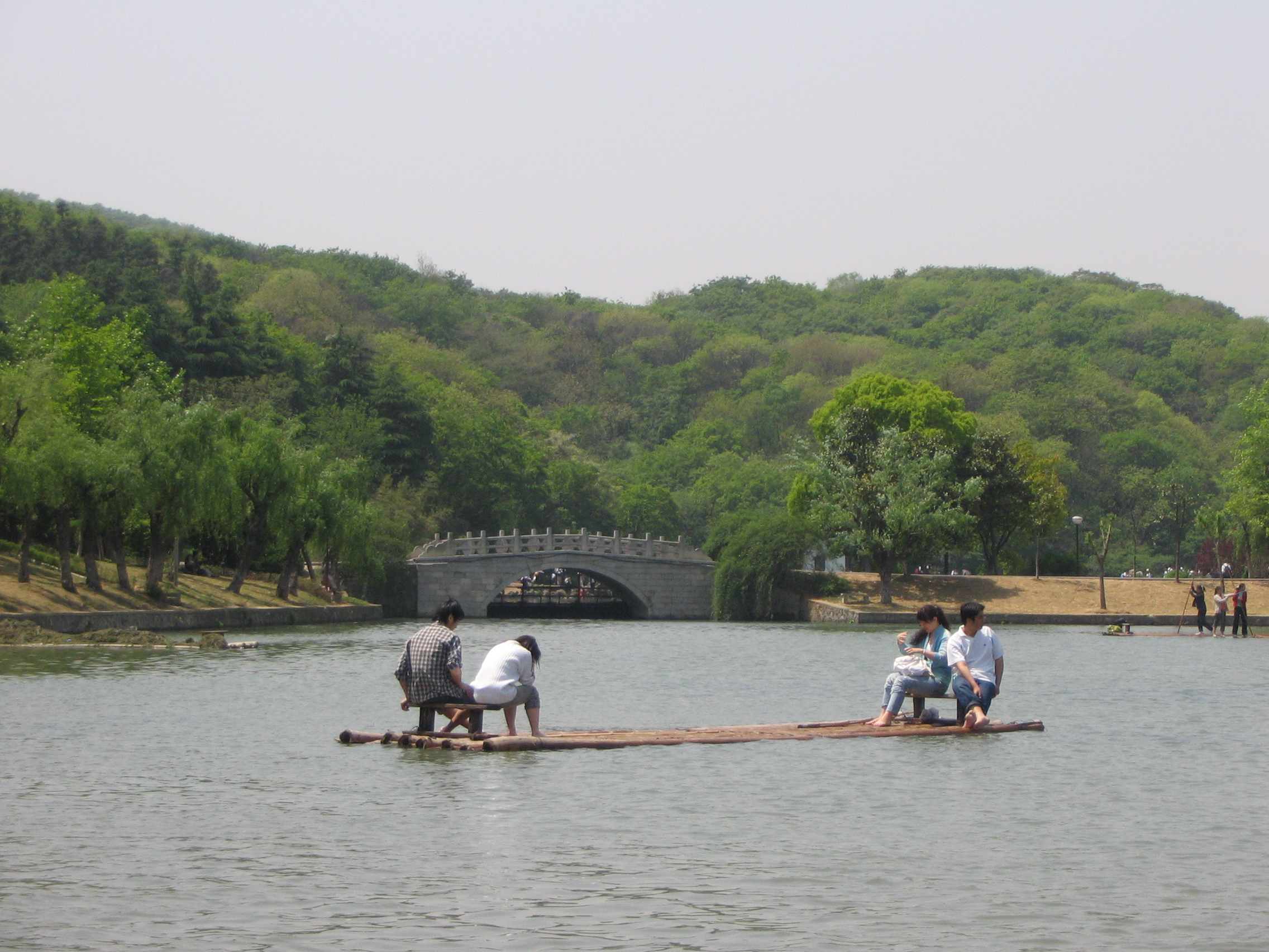 南京珍珠泉风景区